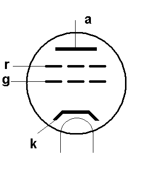 tetrode; eigen werk